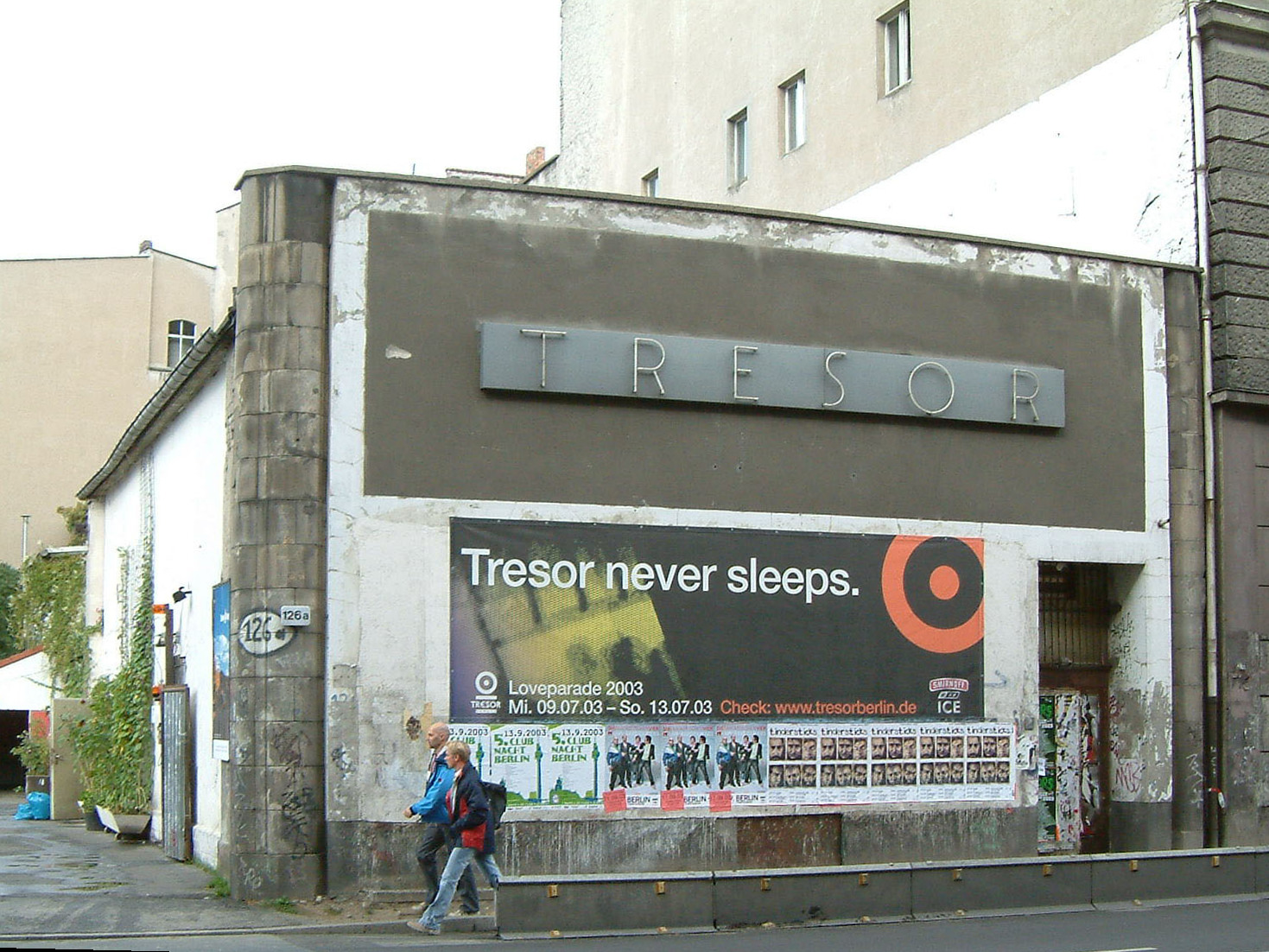 Tresor (Club) in Berlin September 2003